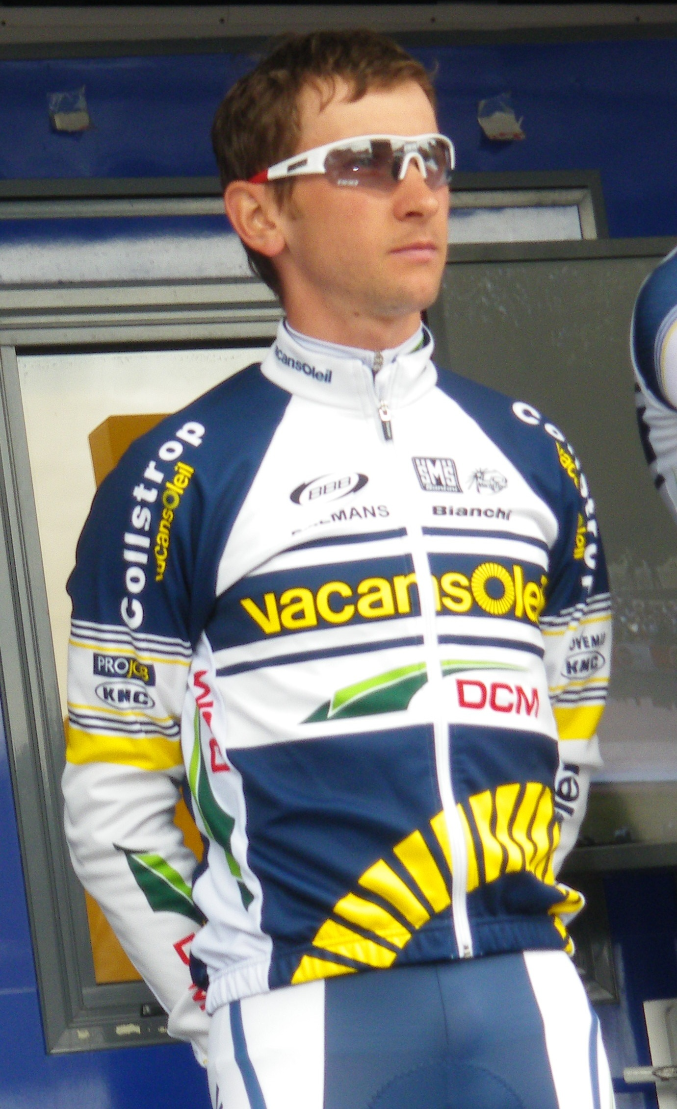 Présentation des coureurs au départ de la dernière étape : Jacek Morajko